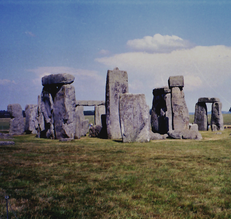 Stonehenge